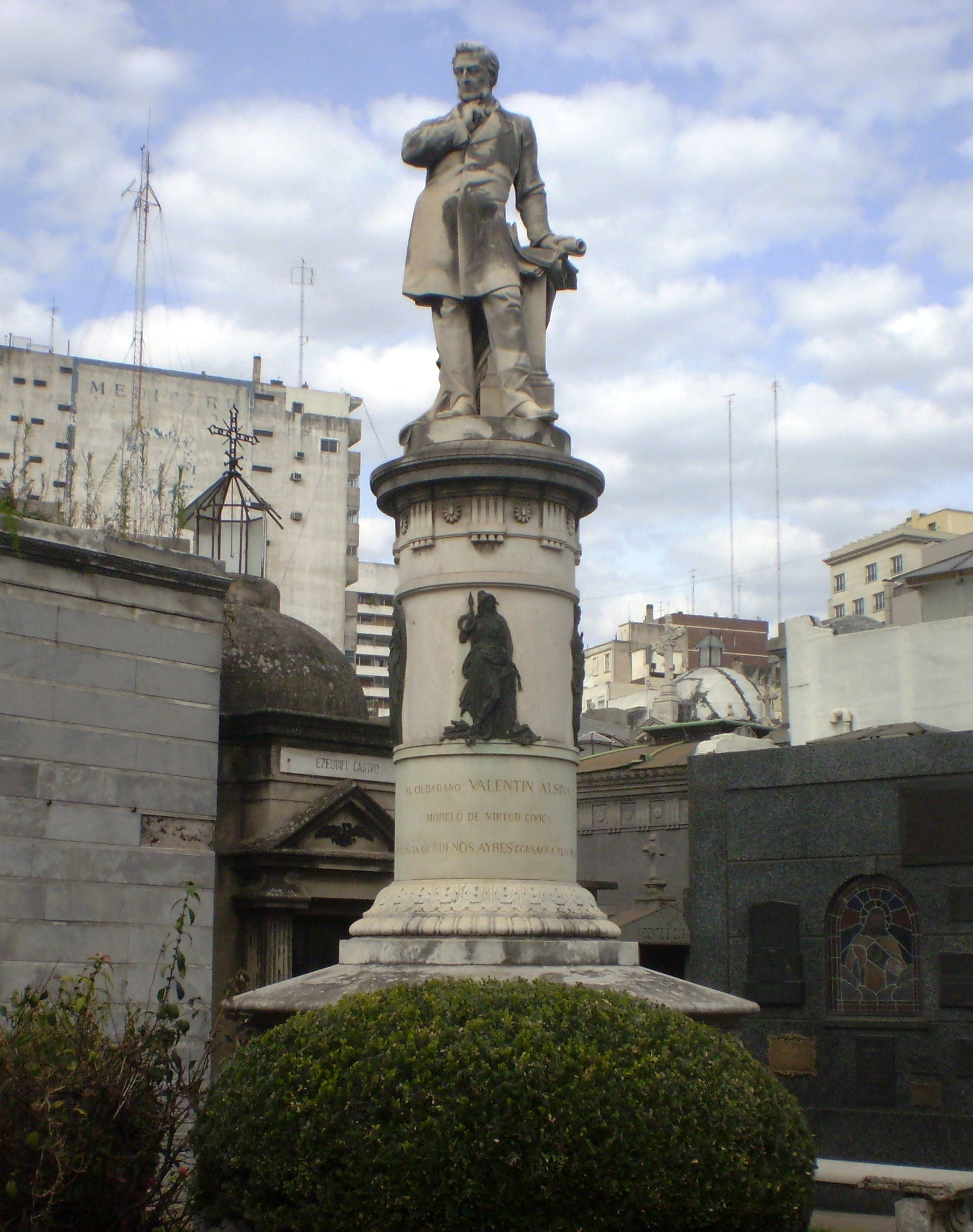 Monumento al doctor Valentín Alsina, Cementerio de la Recoleta, Buenos Aires. Obra del escultor Jacques de Braekeleer. Escultura del artista Juan Livi. La leyenda dice al pie dice: " Sinite parvulos venire ad me"